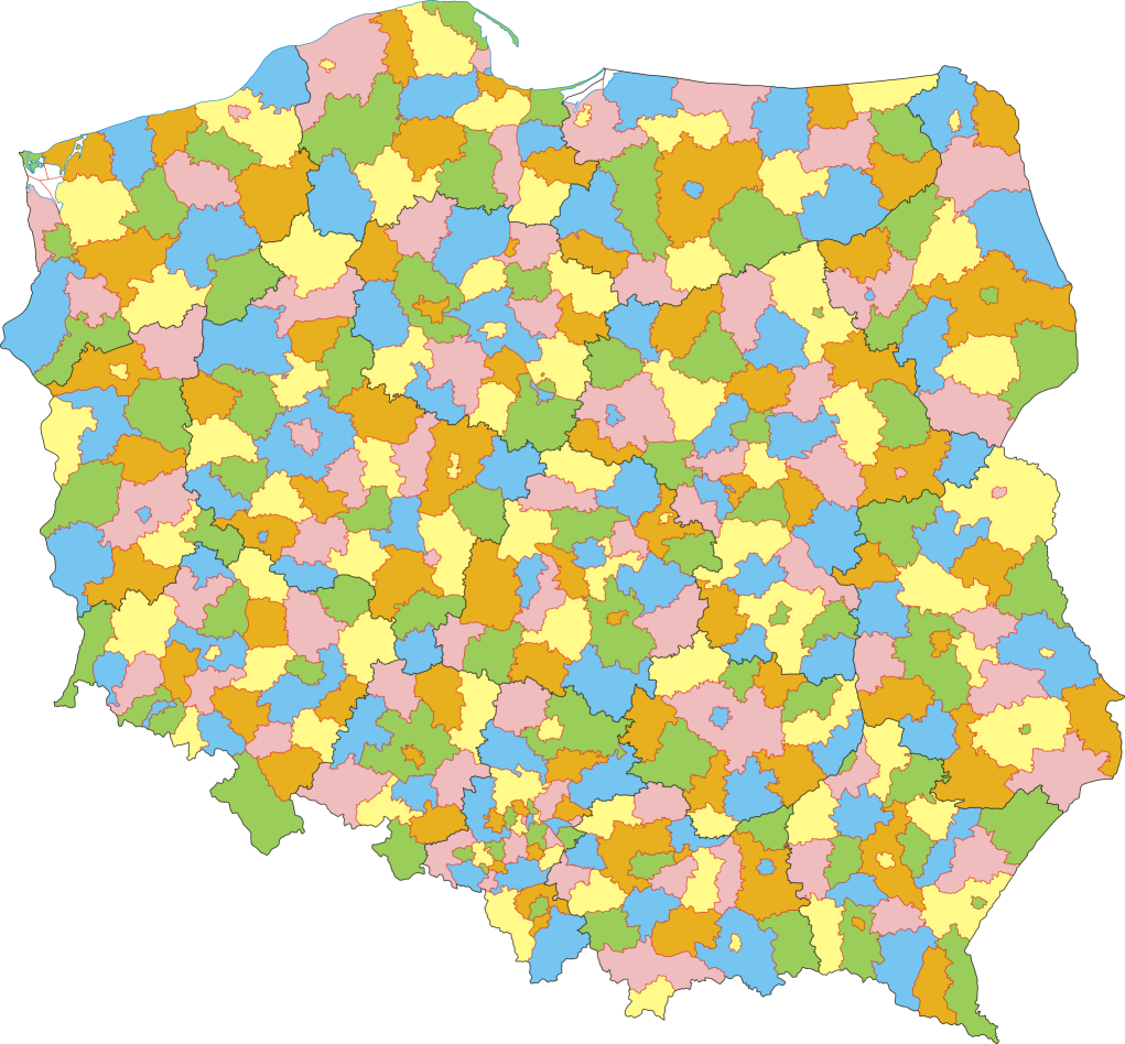 Mapa administracyjna Polski z zaznaczonymi powiatami (w tym miastami na prawach powiatu) i granicami województw, stan na 1 stycznia 2007. Autor: Aotearoa Administrative map of Polish counties (powiaty) (including cities with county rights) with borders of voivodships (województwa), as of January 1, 2007. By Aotearoa